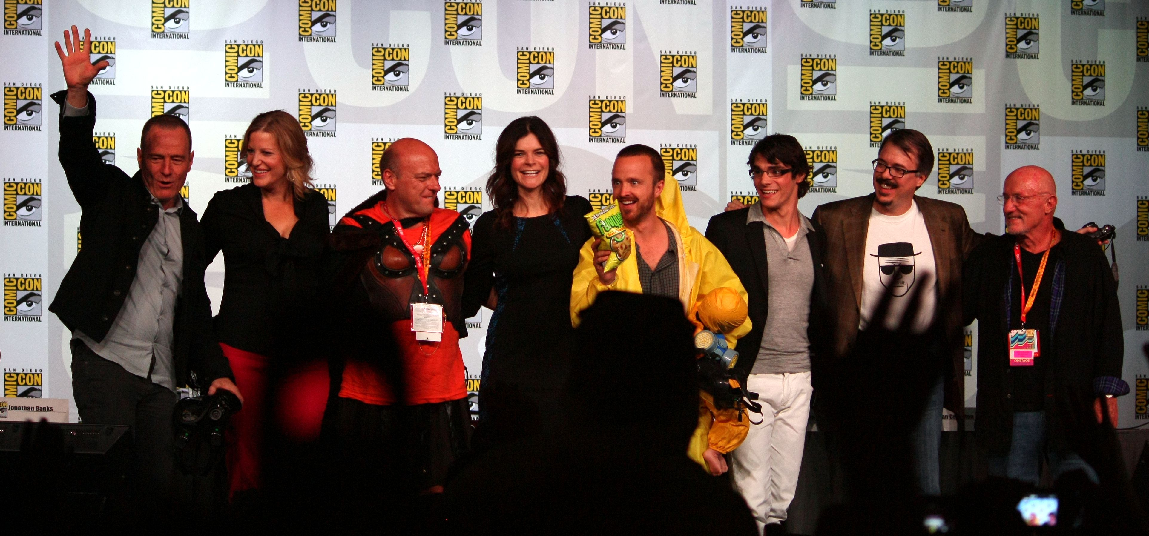 Die Besetzung von Breaking Bad auf dem Breaking Bad Panel auf der Comic-Con International 2012 in San Diego